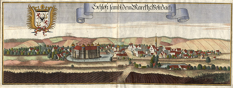 Michael Wening (1645-1718): Schloß sambt dem Marckh Wolnzach (Schloss und Markt Wolnzach) Kolorierter Stich aus Historico-topographica Descriptio. Verlegt bei Johann Lucas Straub, München 1701-26.